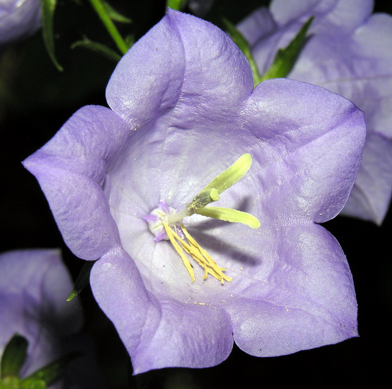 Didžiažiedis katilėlis (Campanula persicifolia), žiedas Šeima. Katilėliniai (Campanulaceae) Foto: Algirdas, 2006 m. liepos 1 d., Lietuva